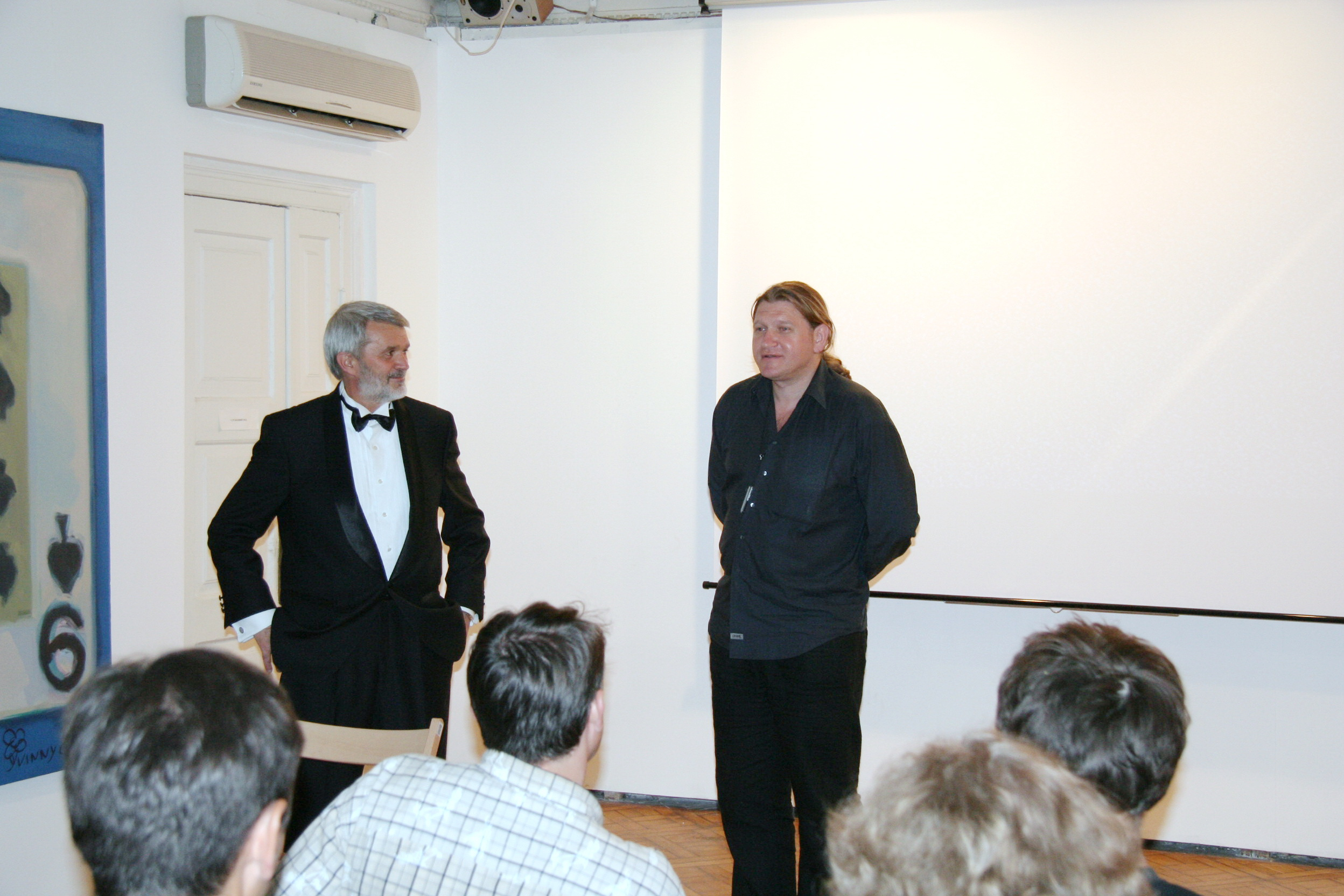 Евгений Карась на заседании жюри кинофестиваля "Открытая ночь", 2006 год, Карась Галерея, Киев.